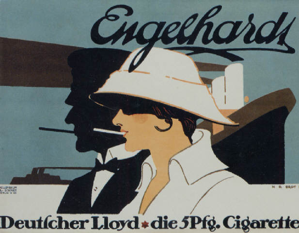 Hans Rudi Erdt: Engelhardt, 1915. Advertising poster. Color Lithograph, 27,6 x 37,4 in. / 70 x 95 cm